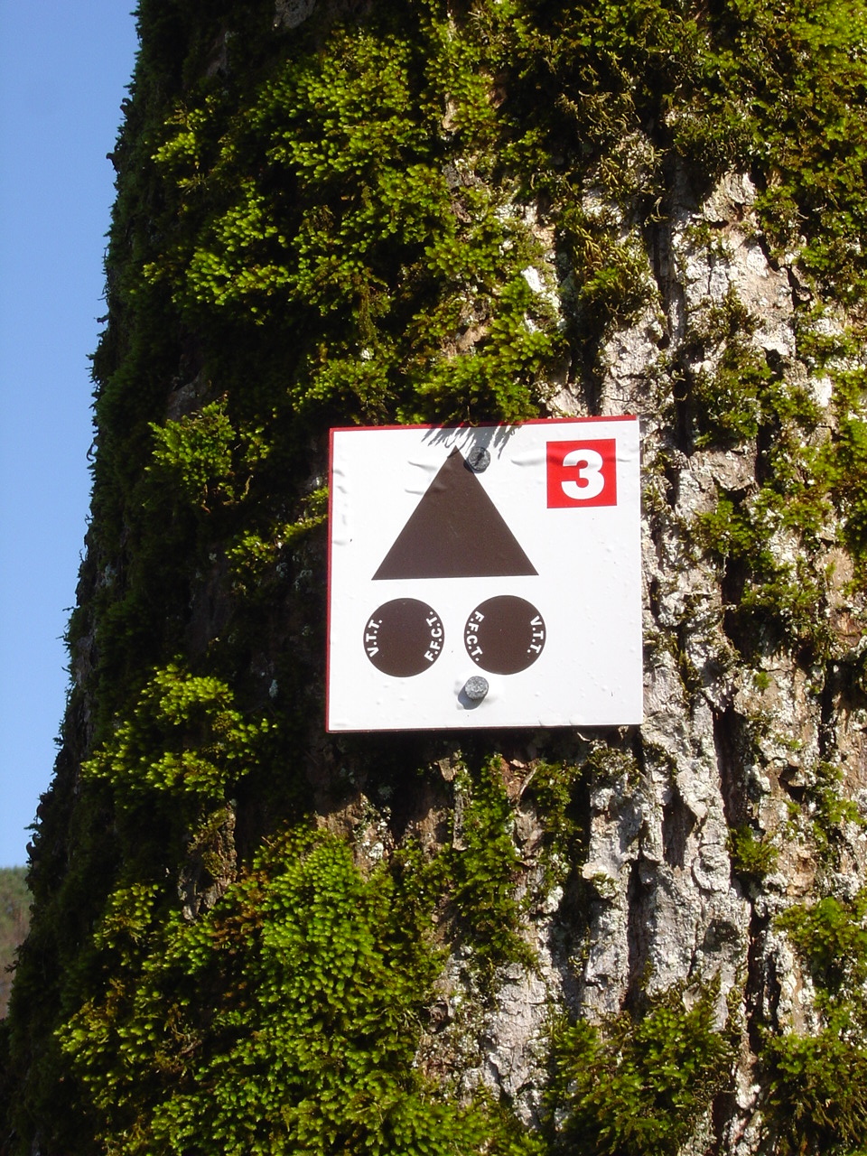 Panneau sentier